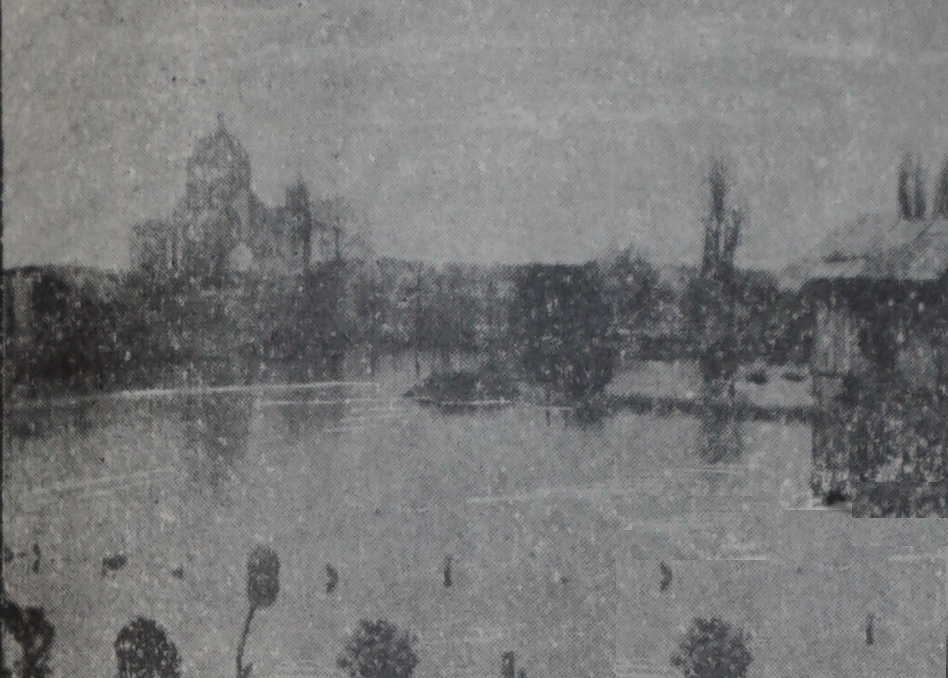 lors des crues dans la Marne en 1910.